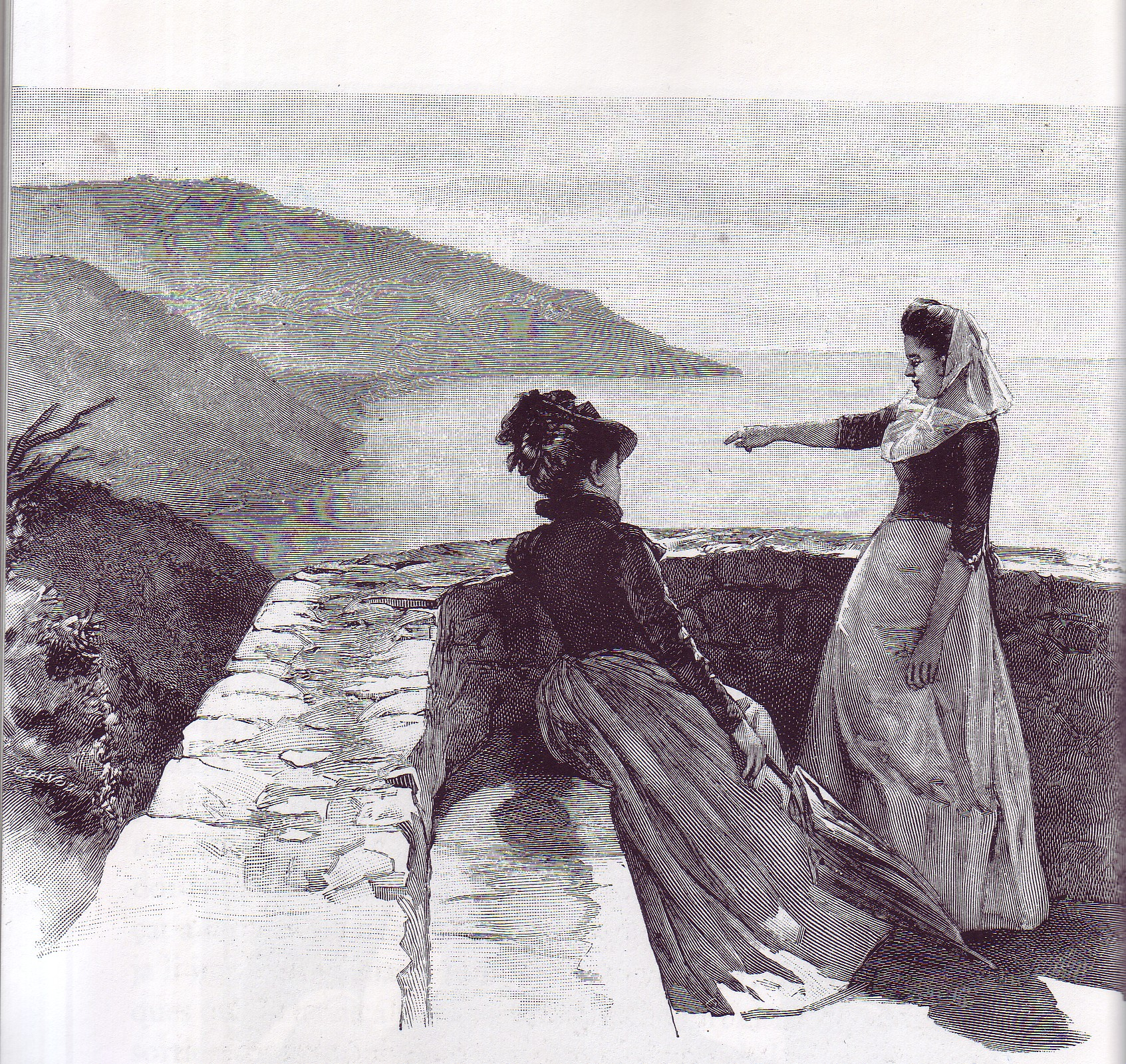 Catalina Homar présentant Majorque à l'impératrice Sissi